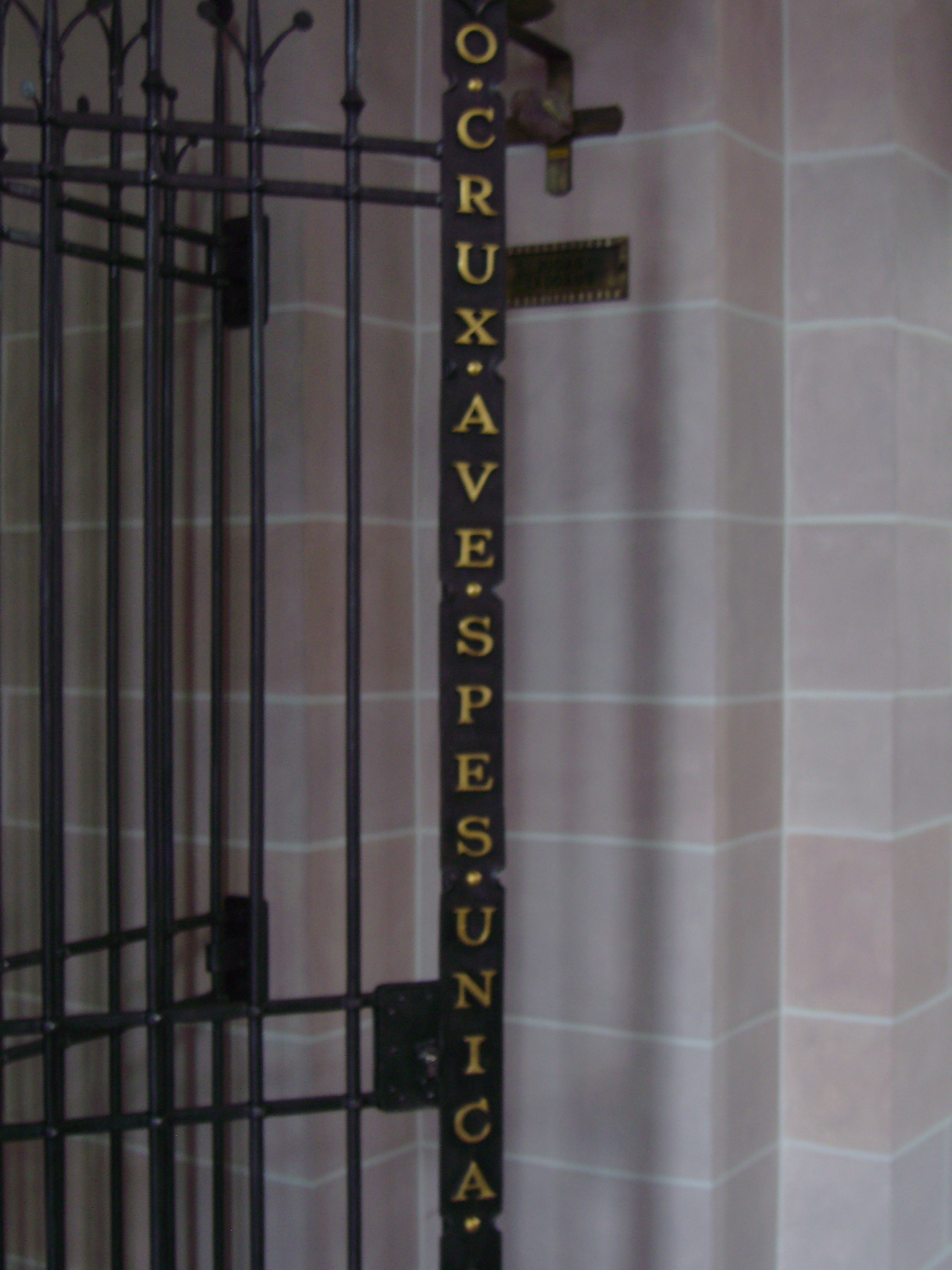 Inschrift auf einem Gitter in der Delbrücker Johannes Baptist Kirche